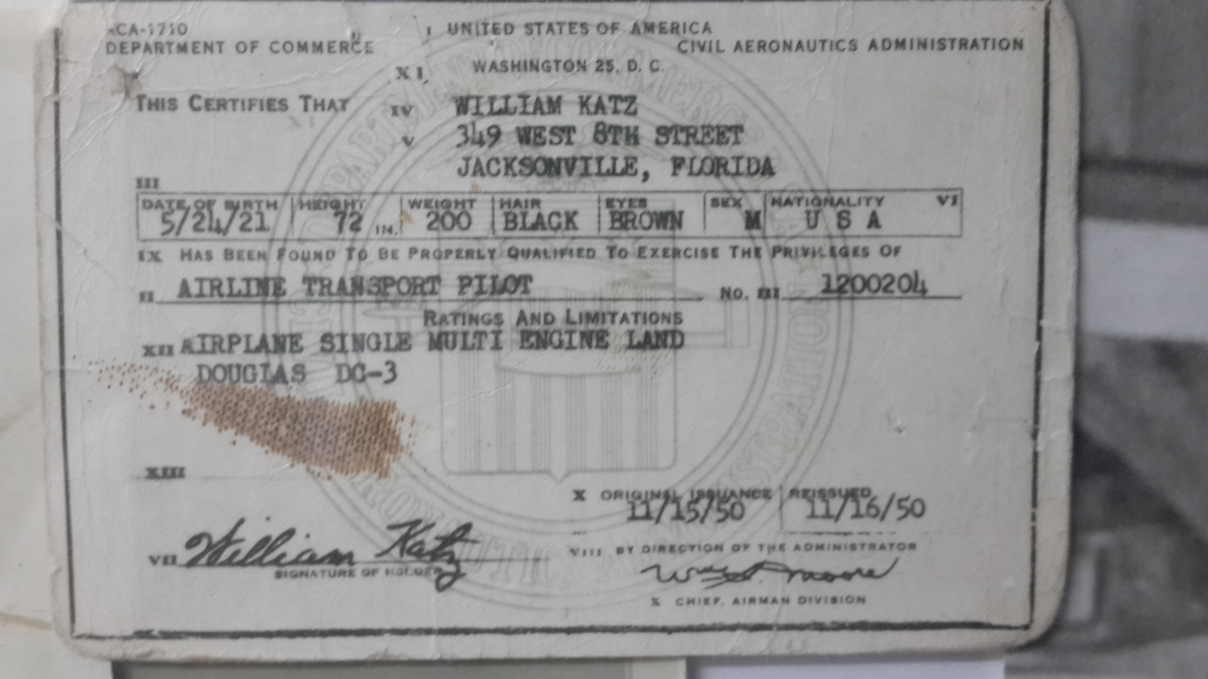 רשיון הטיסה האזרחי הראשון של ויליאם כץ